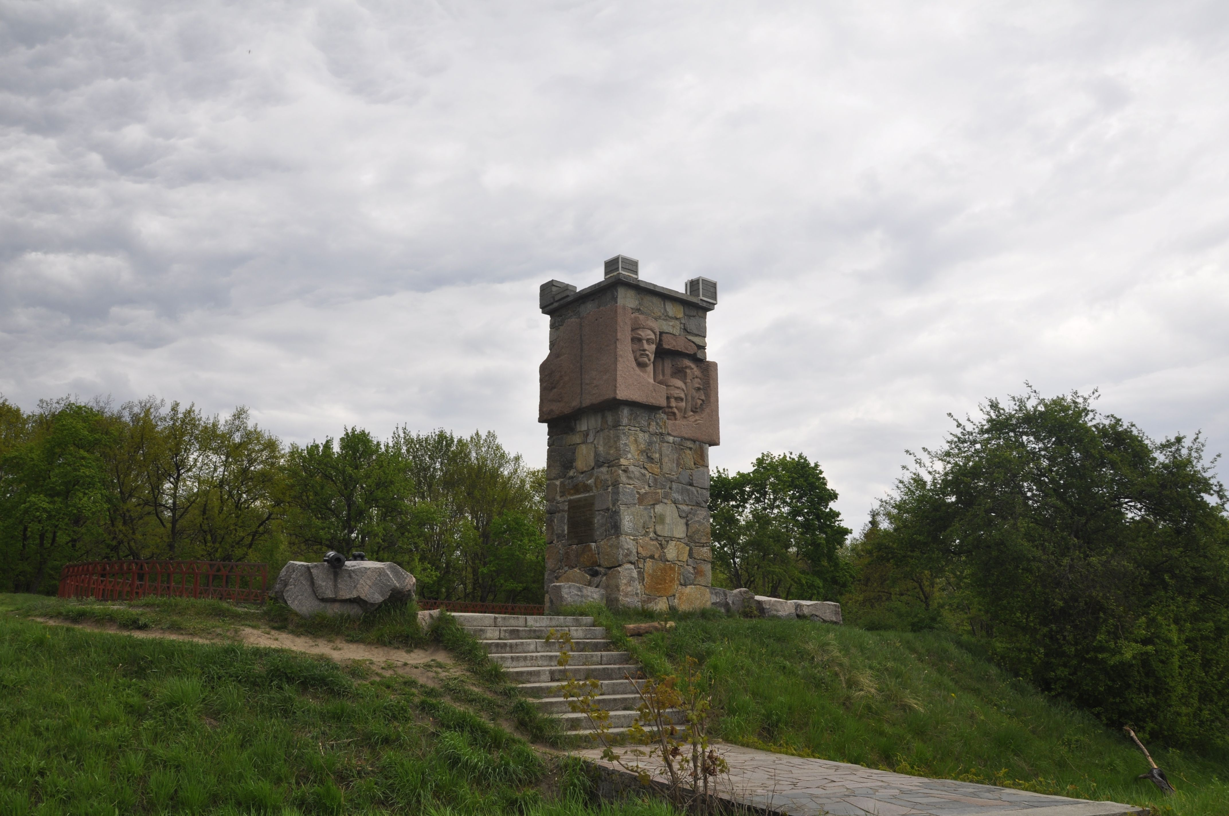 Пам'ятник на честь визволення міста Біла Церква в 1702 році козаками під проводом козацького отамана Семена Палія, Біла Церква, «Палієва гора» (на території дендропарку «Олександрія»)